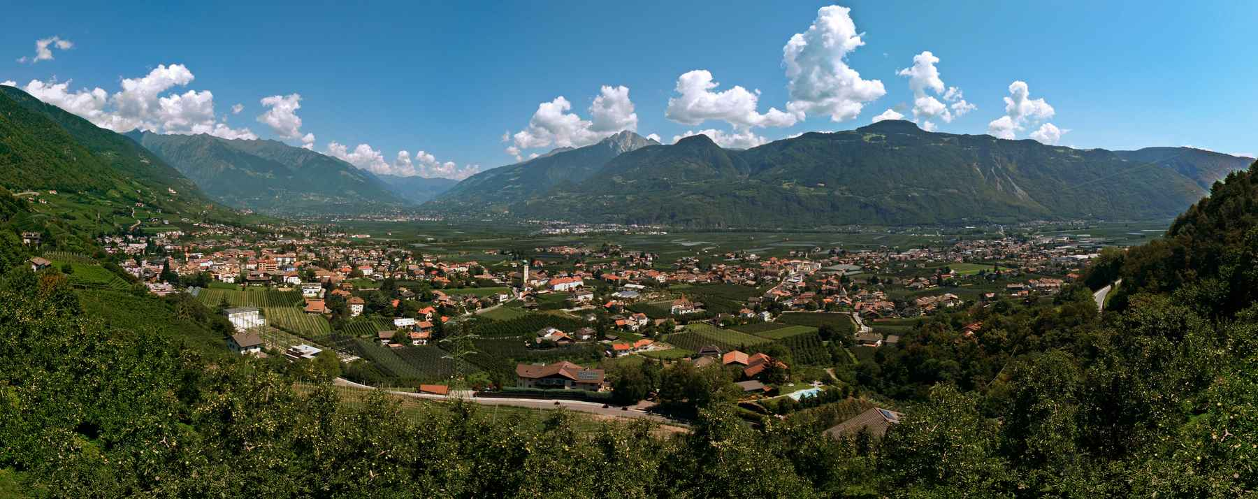 Lana bei Meran, Südtirol, Italien/Lana near Merano, Alto Adige, Italy